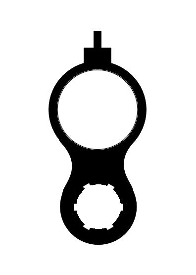 Laufbündelung einer Bockbücksflinte. Schrotlauf oben. Kugellauf mit Zügen und Feldern unten. Zeichnung Joachim Baecker 2005.